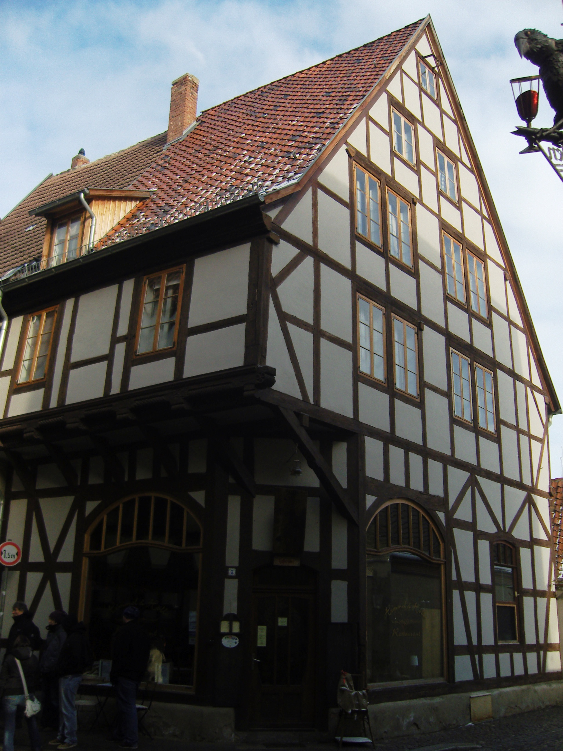 Denkmalgeschütztes Wohnhaus in der Straße Hölle 5 in Quedlinburg